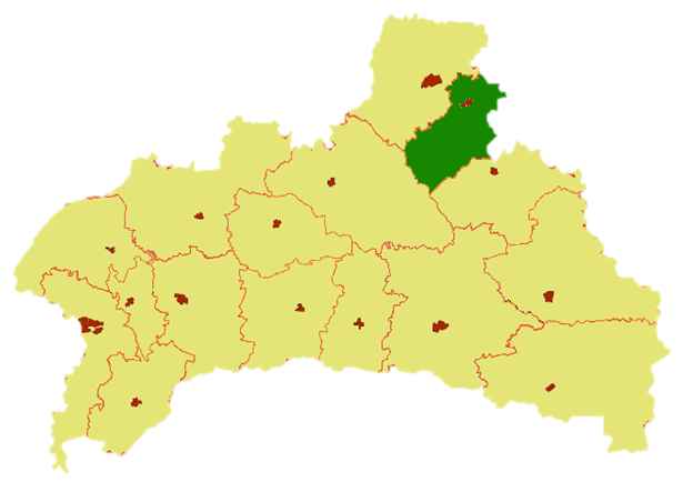 Ljachavický rajón v rámci Brestské oblasti